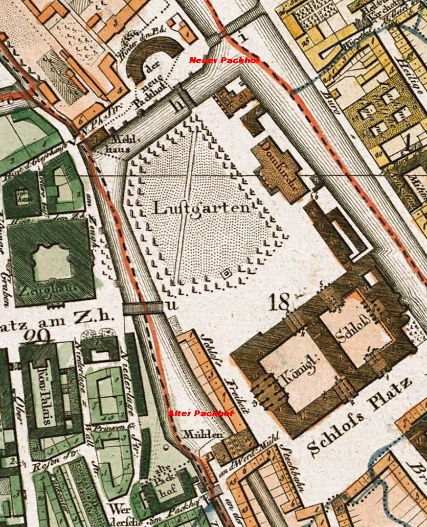 Lage des Alten und des Neuen Packhofs in Berlin 1811